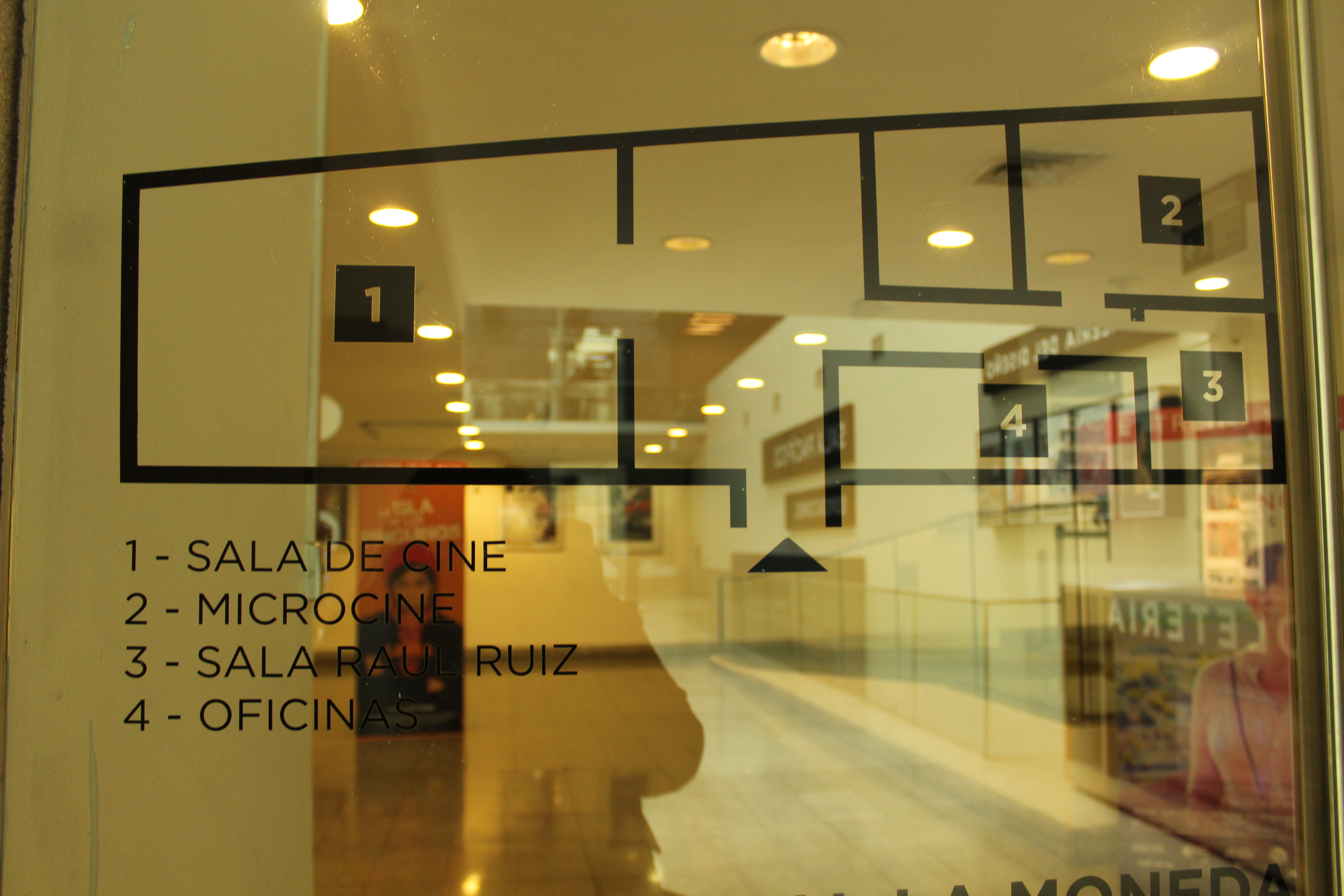 mapa de las salas de la Cineteca nacional de Chile